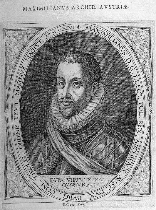 Maximilian III. (Vorderösterreich)